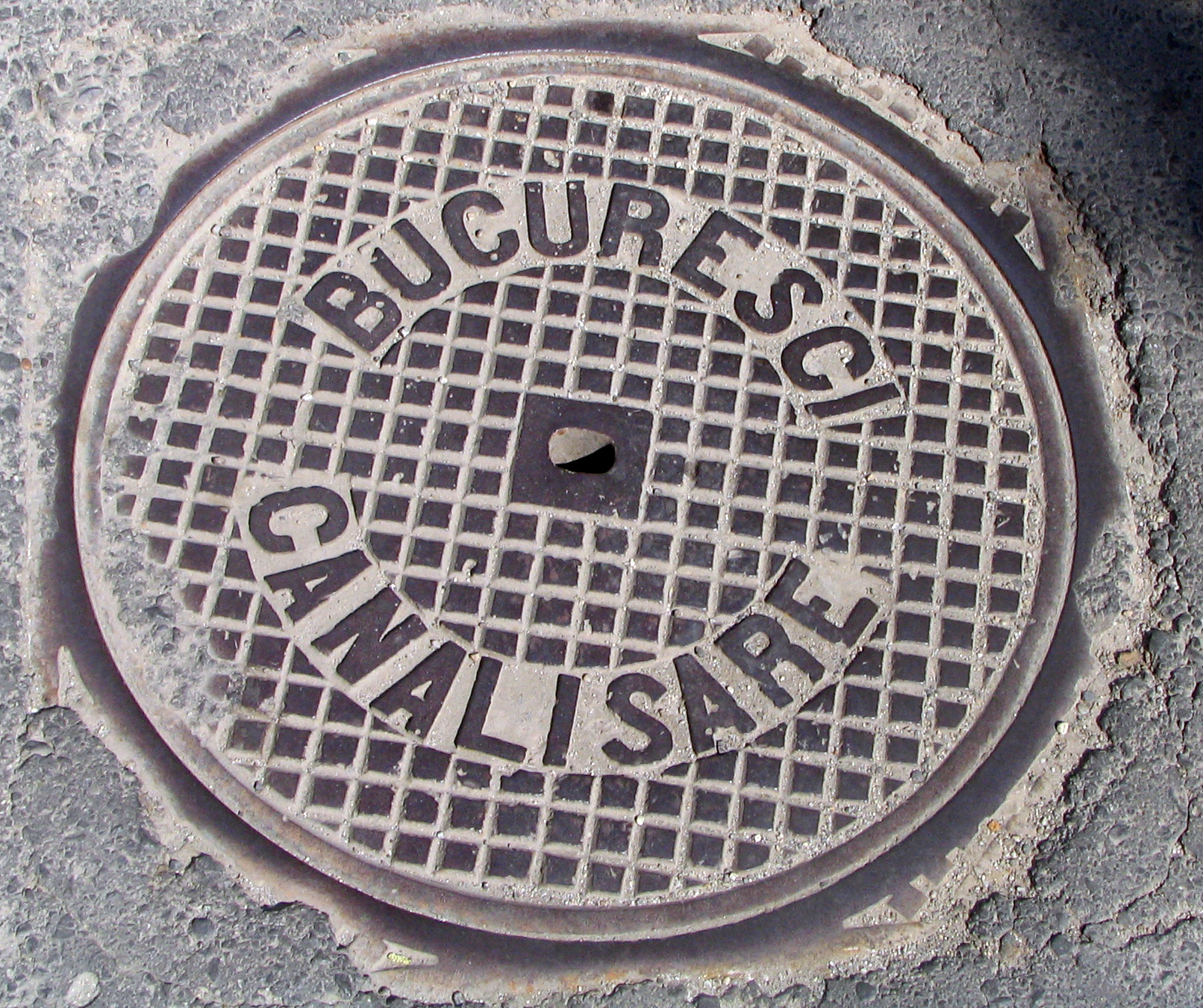 Capac de canal BUCURESCI CANALISARE